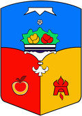 Герб Бахчисарая